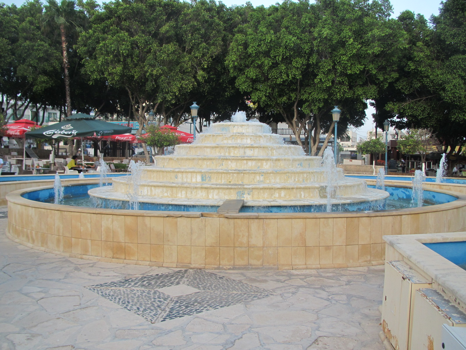 Ayia Napa Monastery